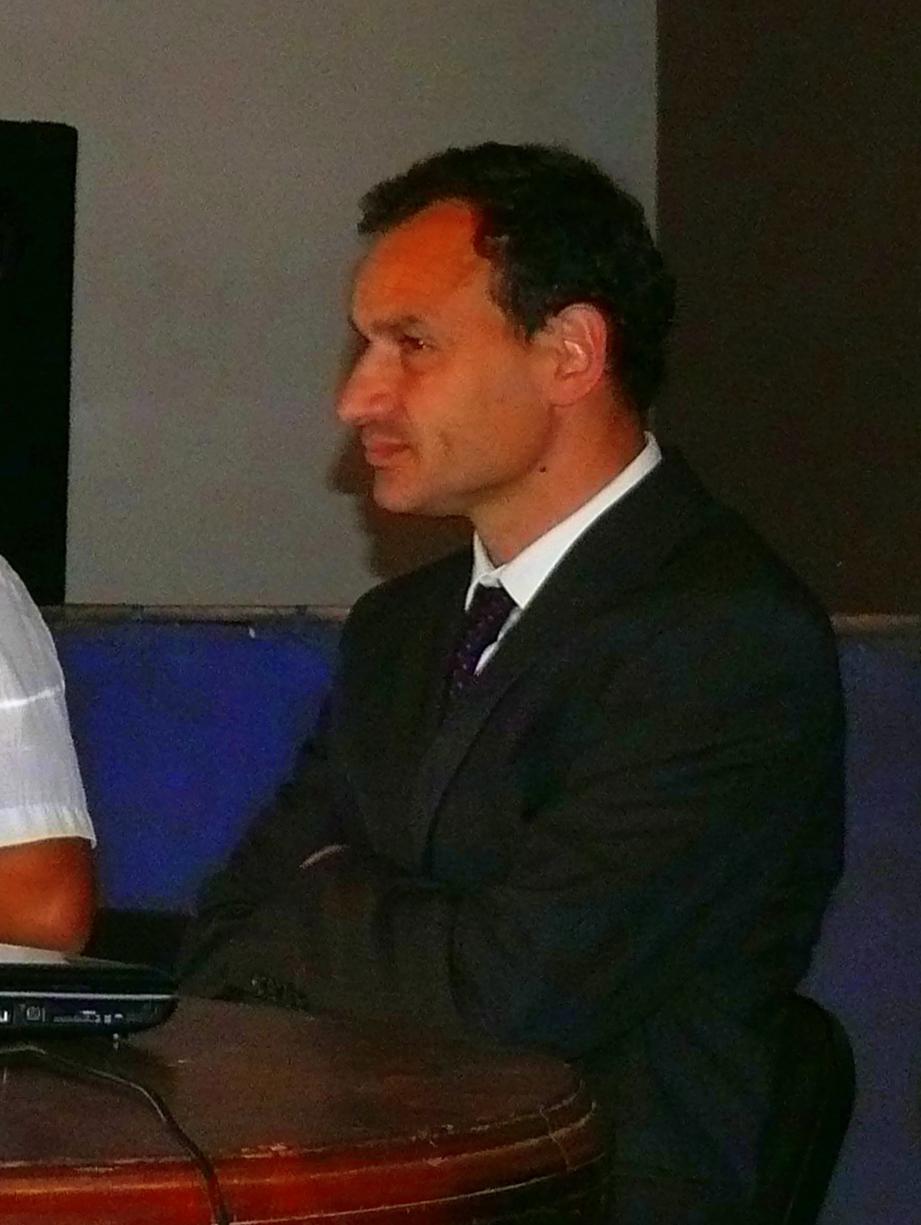 El Intendente de la Ciudad de La Plata en la charla por el día Internacional del Voluntario